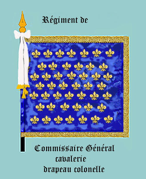 Standarte des Inhabers des Kavallerierregiment „Commissaire Général-cavalerie“ Königreich Frankreich 1668-1791